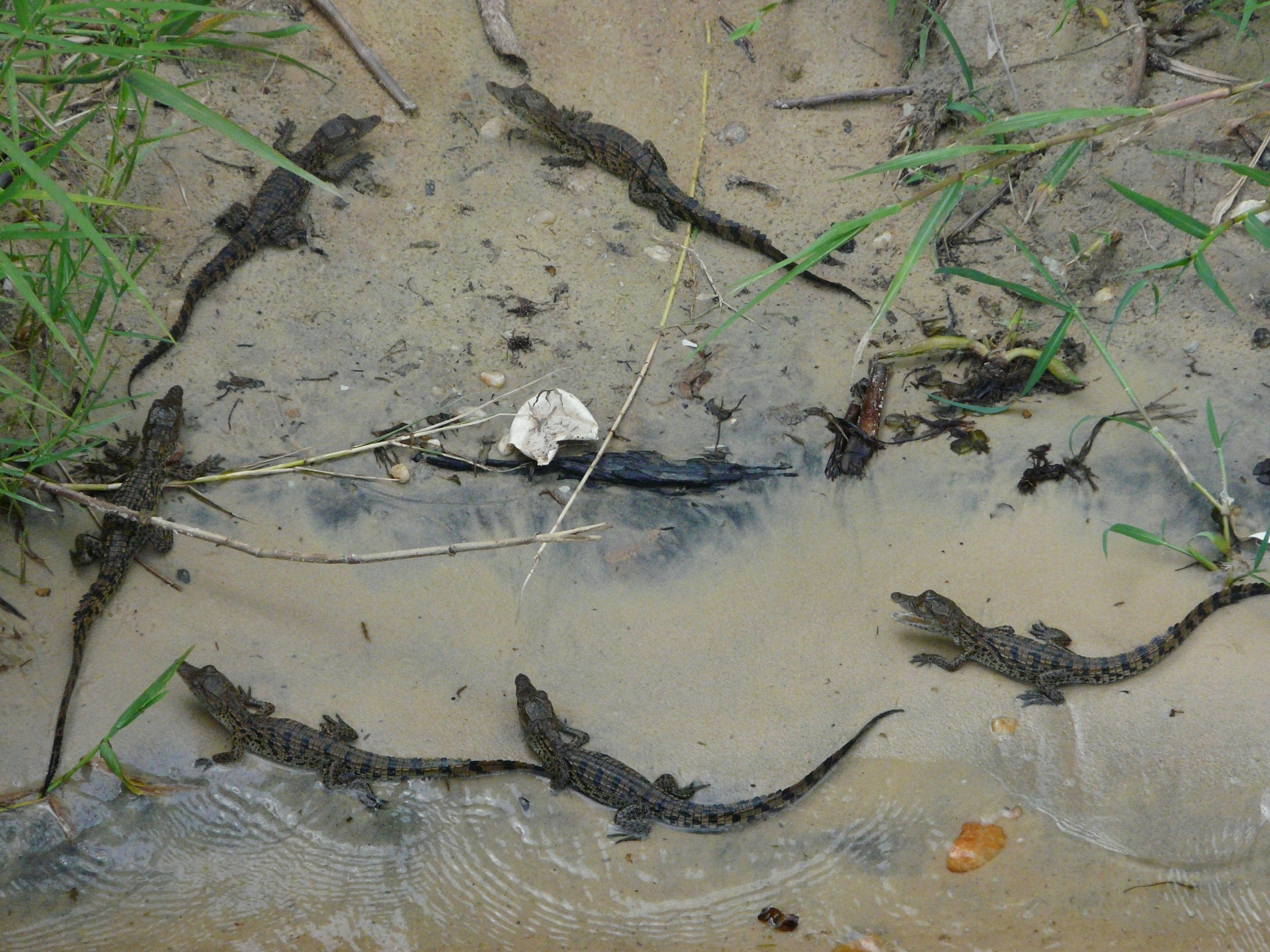 Juvenile Nile Crocodiles